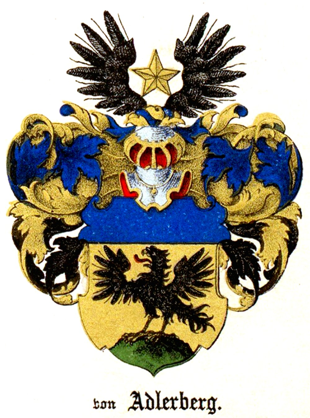 Adlerbergi suguvõsa aadlivapp